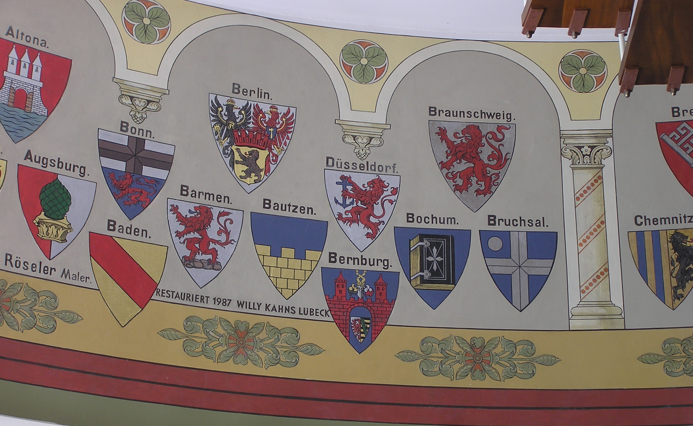 Aumühle,Bismarckturm:Wappen Fries 1.Stock